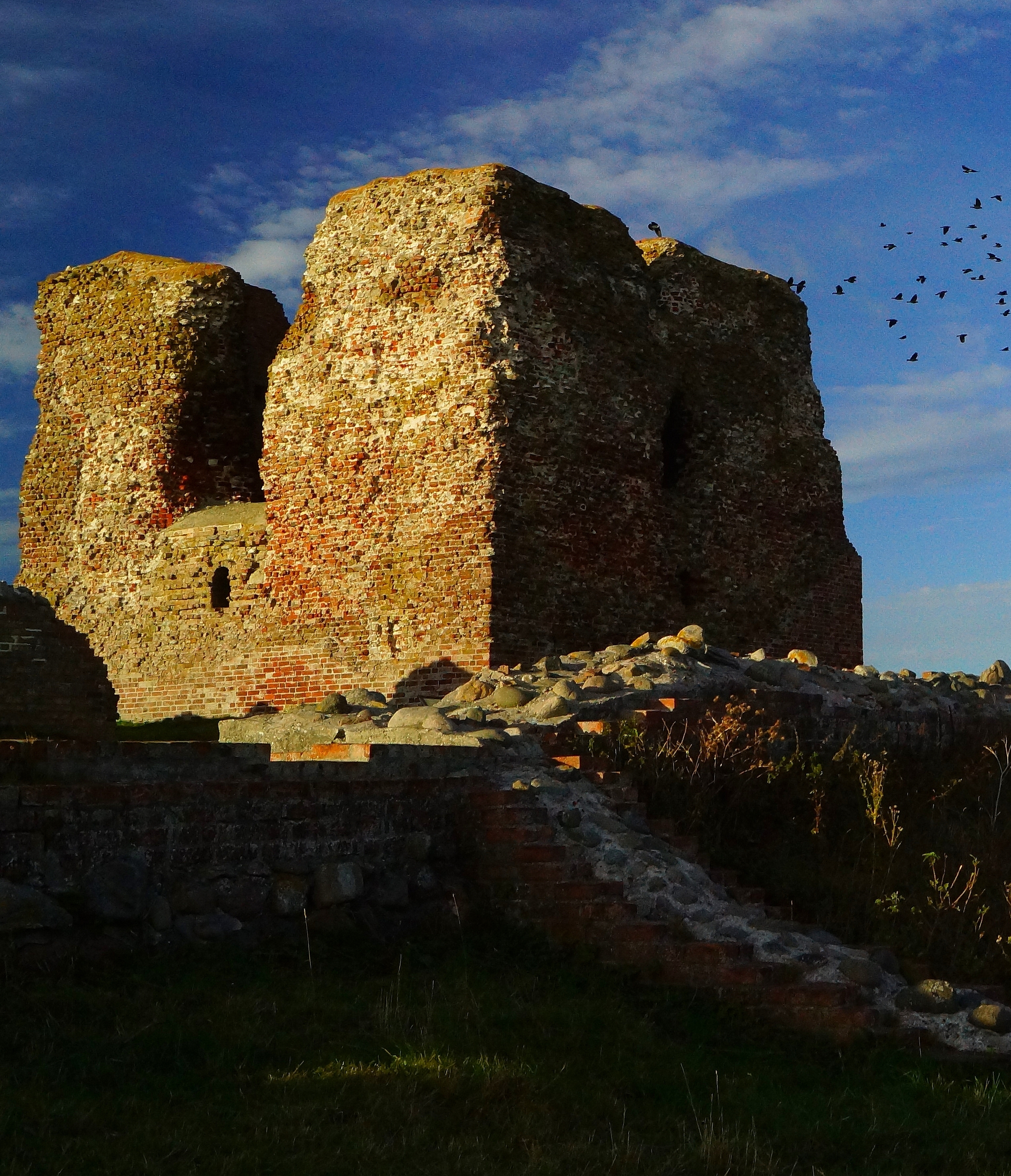 Kalø Slotsruin med alliker